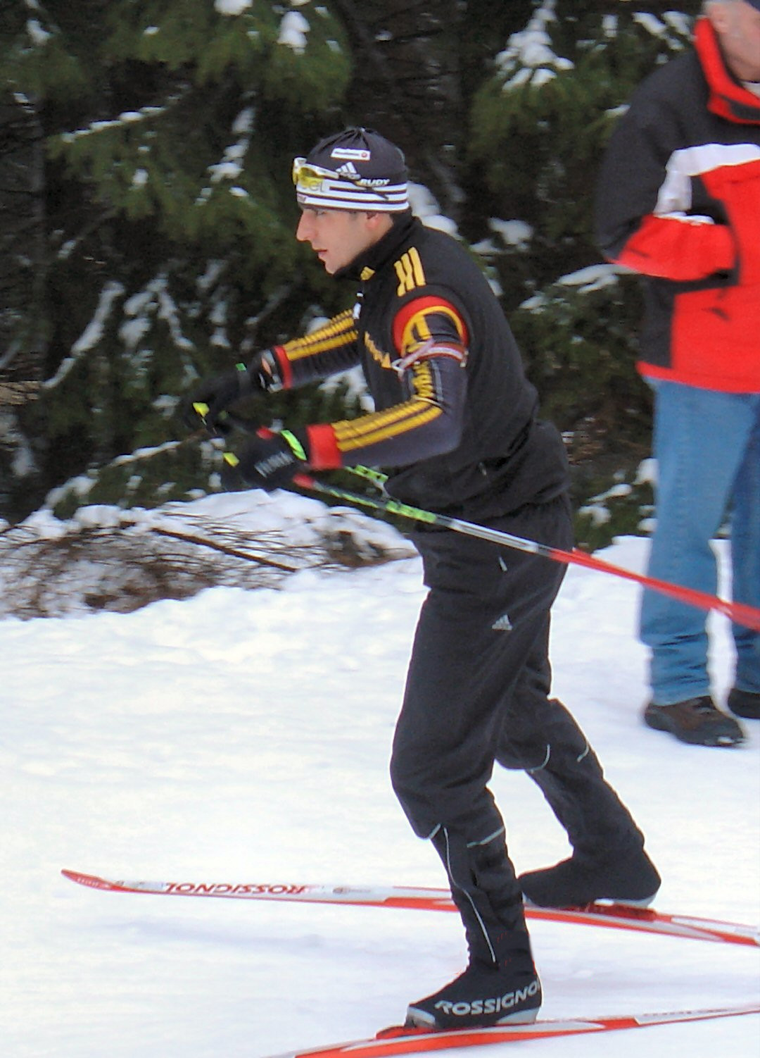 Ricco Gross Biathlon-WM 2004 Oberhof